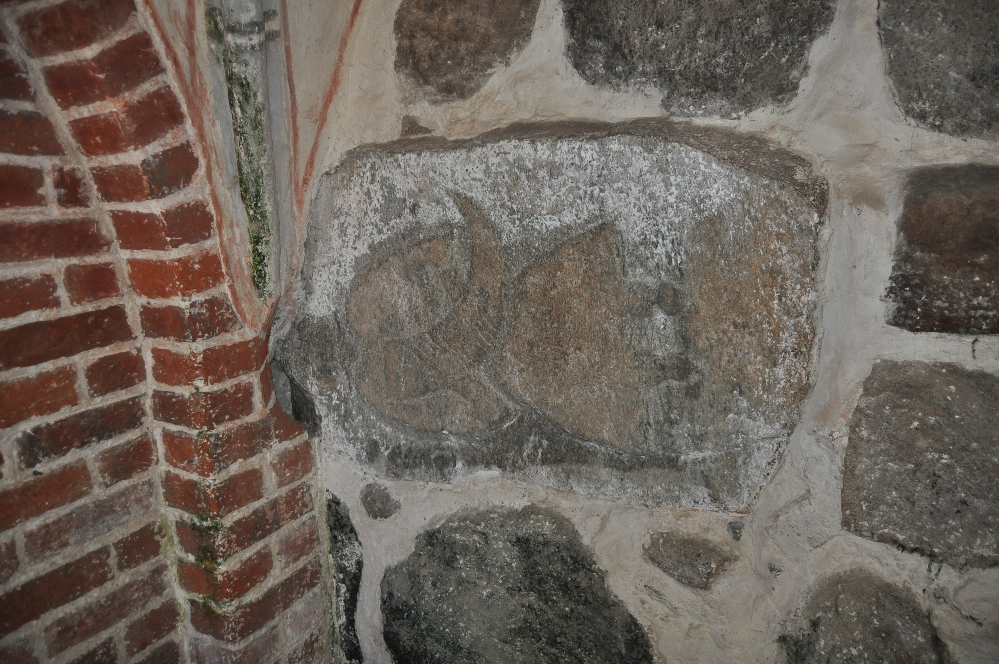 Der Swantevitstein in der Kirche Altenkirchen